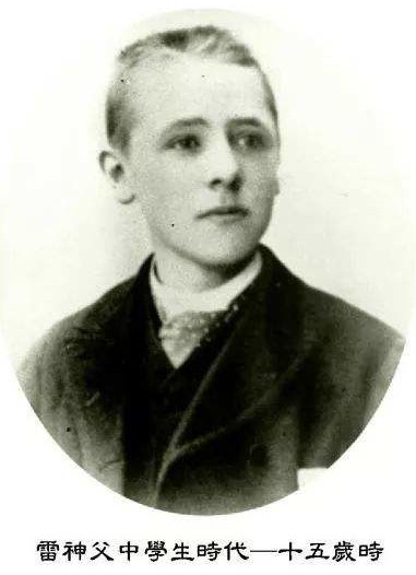 Prêtre belge lazariste, Vincent Lebbe à 15 ans (1892) à l'époque de ses études secondaire (雷神父中学生時代一十五歲時)